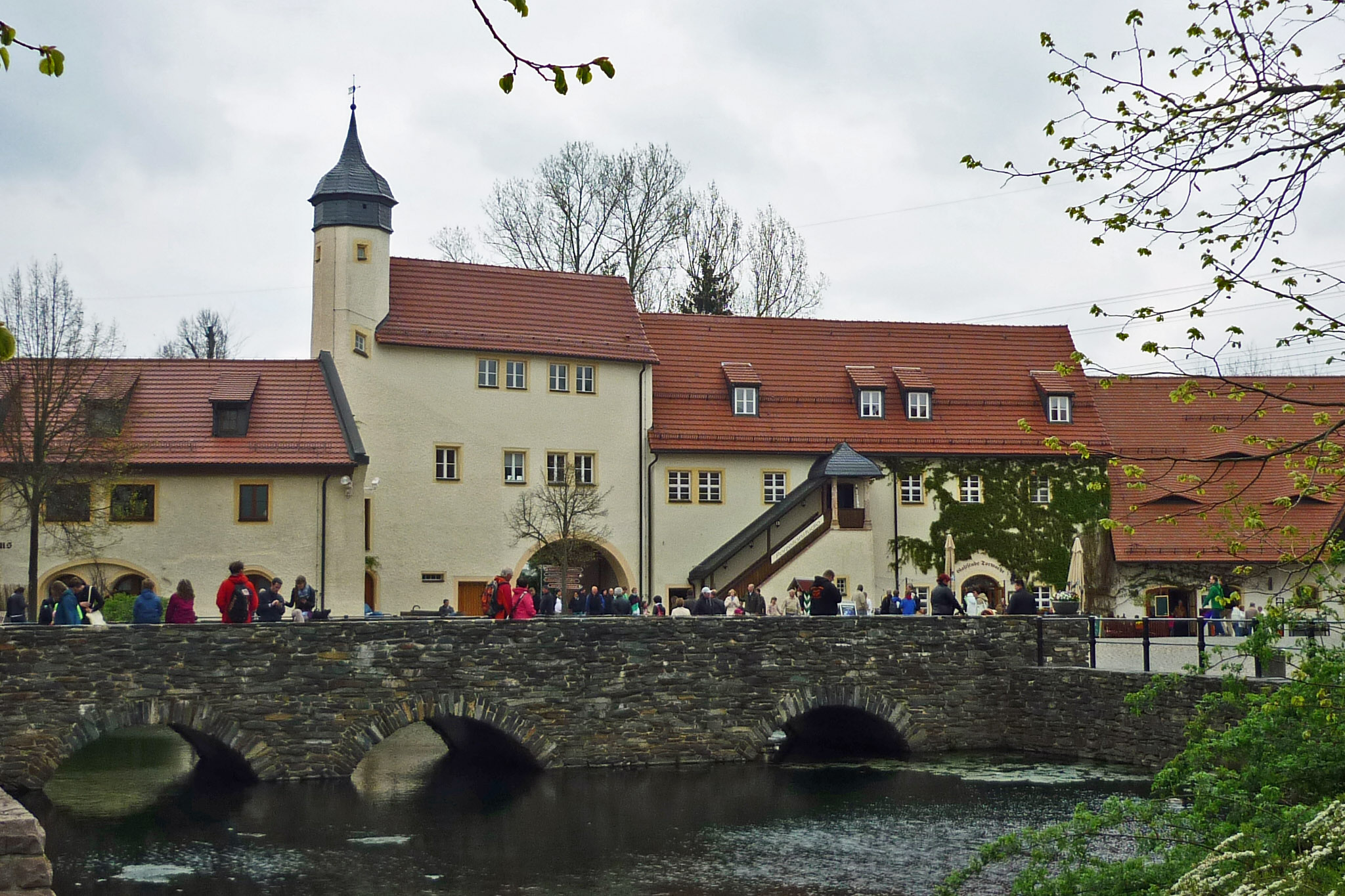 Torhaus am Wasserschloss Klaffenbach bei Chemnitz